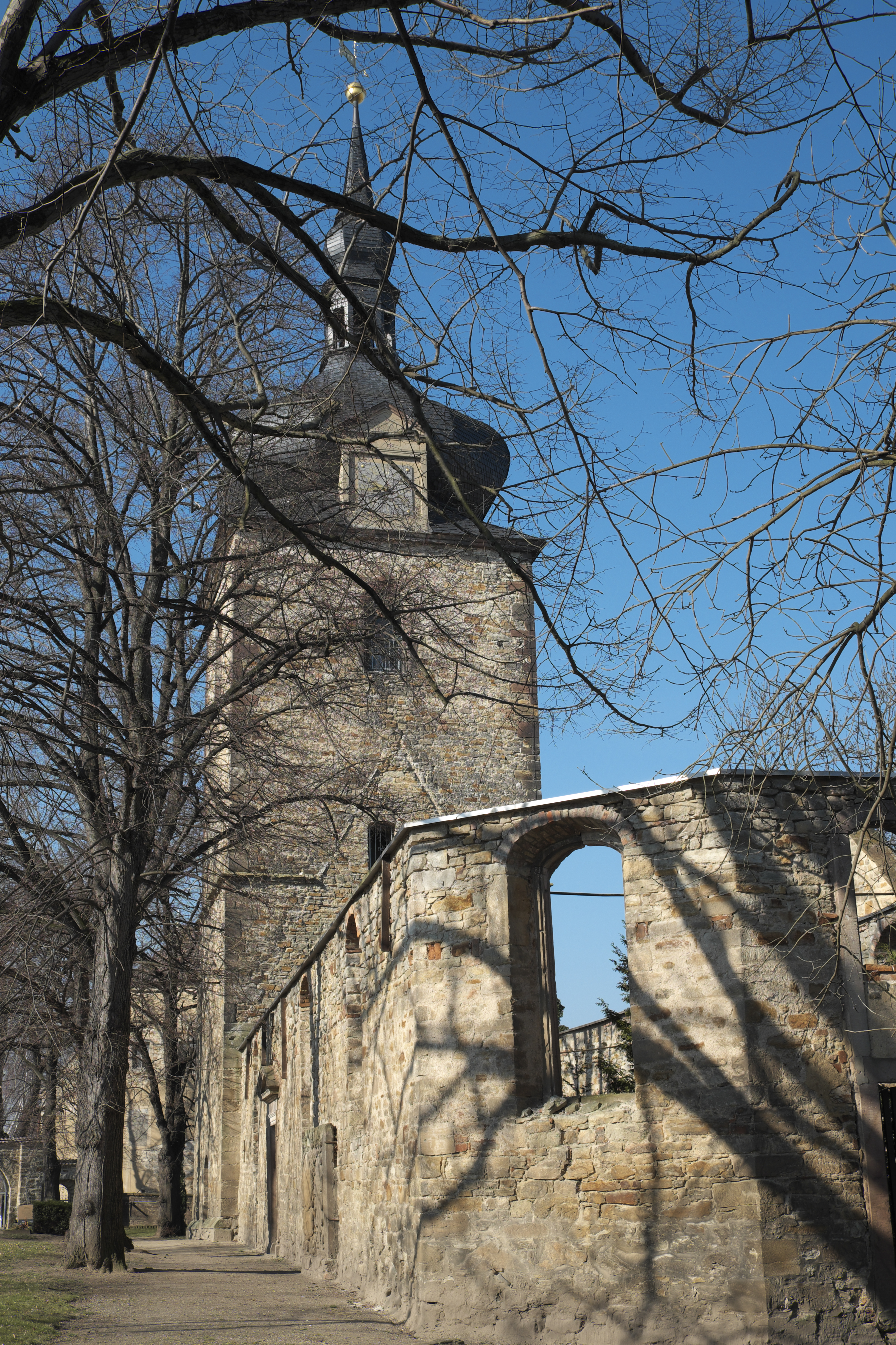 Kirchenruine in Niederklobikau, einem Ortsteil von Bad Lauchstädt im Saalekreis in Sachsen-Anhalt/Deutschland